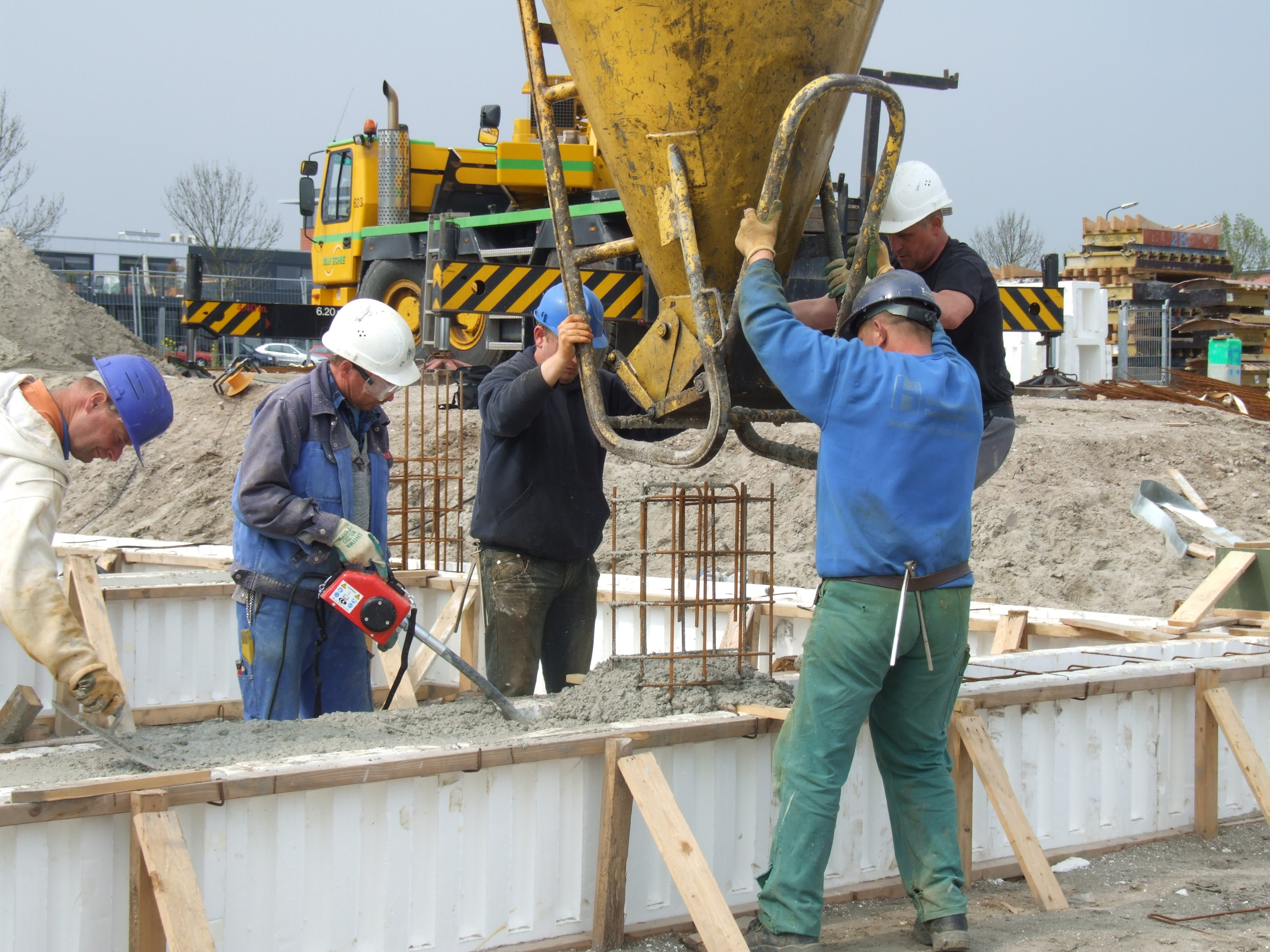 Handstoktrilnaald